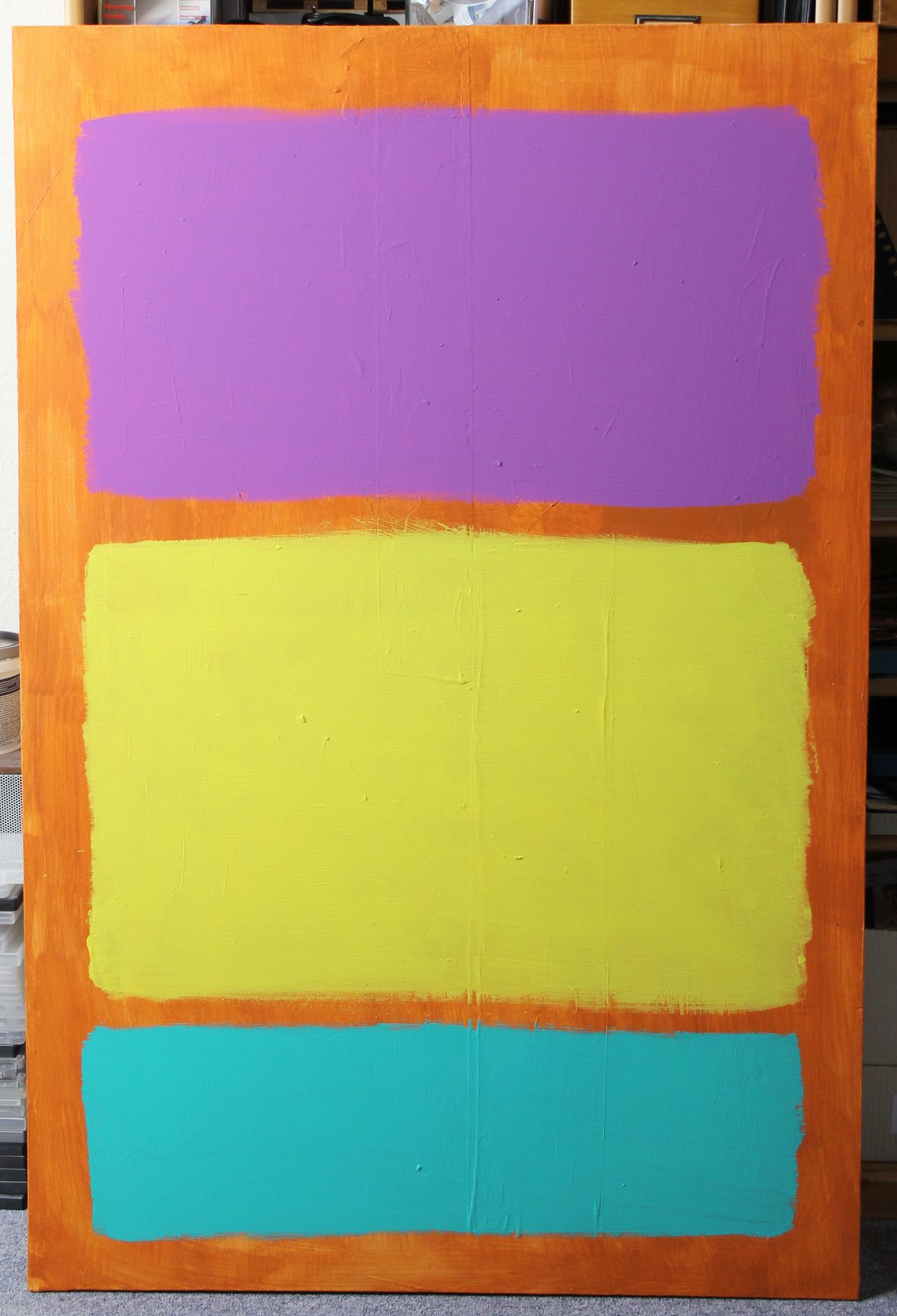 Acrylbild im Stil von Mark Rothko